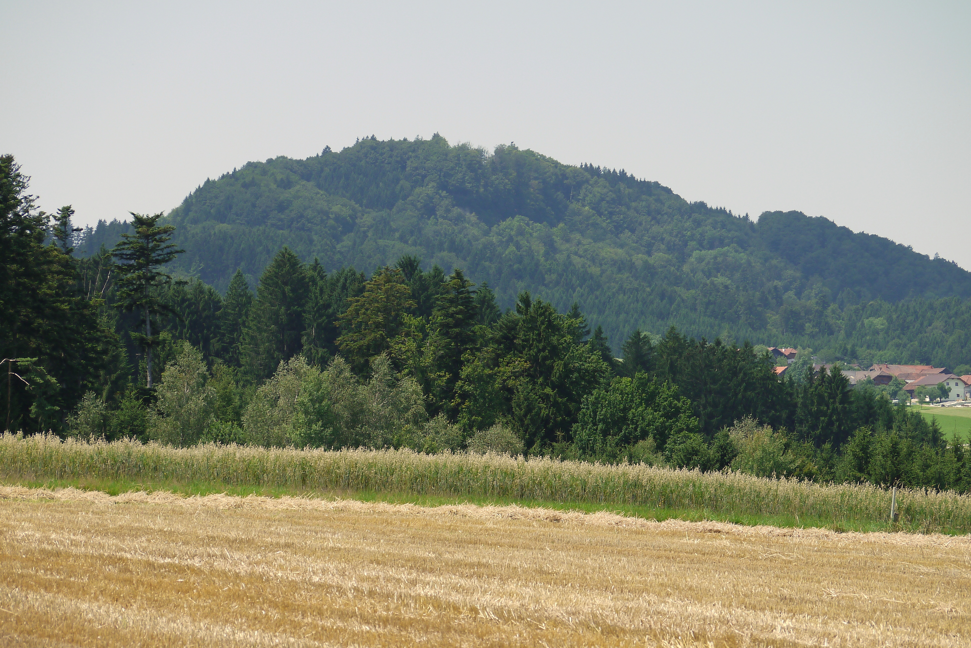 Frankenburg Hobelsberg und Raitenberg aus Innerhörgersteig